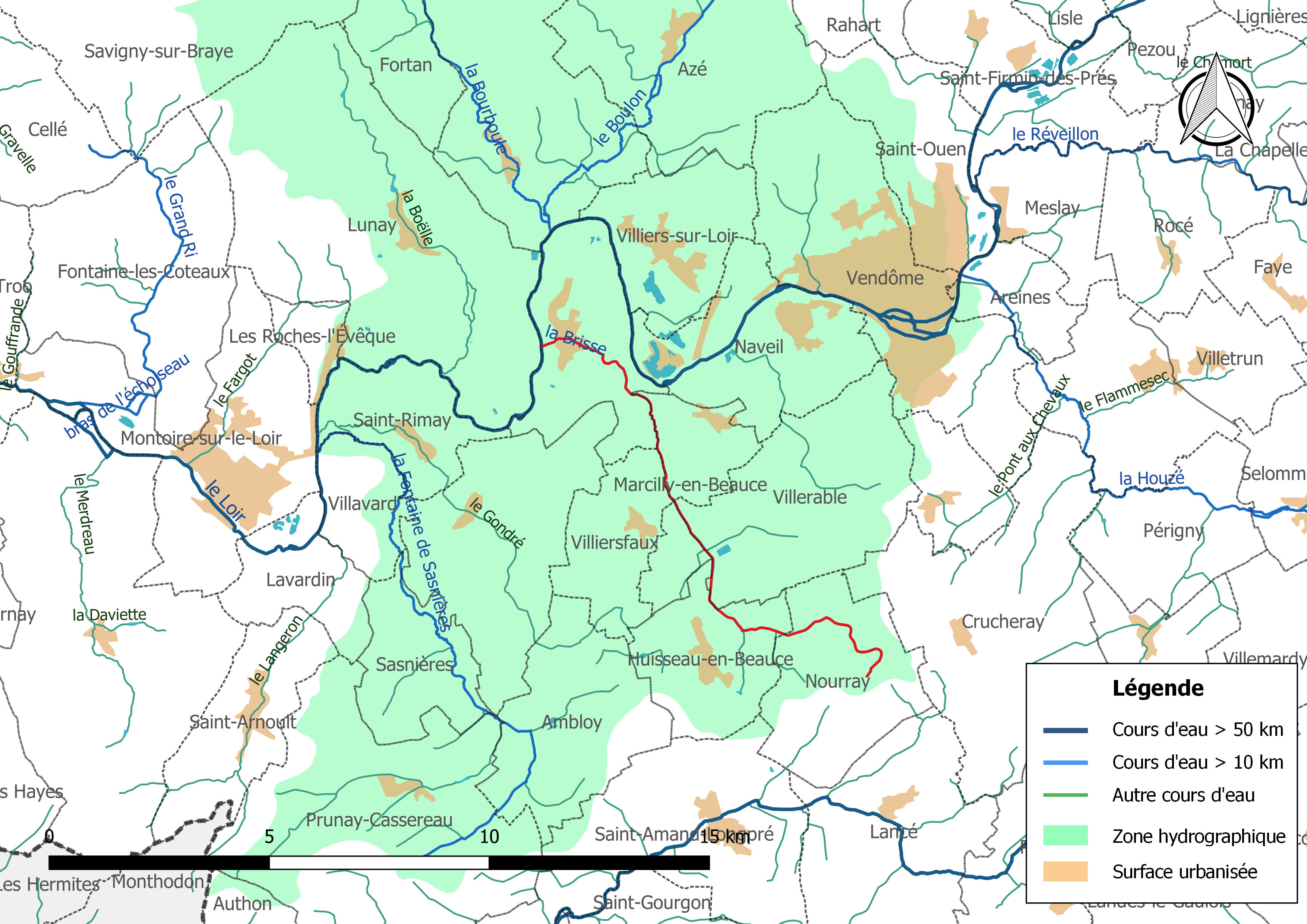 Carte du cours d'eau « la Brisse » et de son bassin versant (zone hydrographique dans laquelle il s'insère).